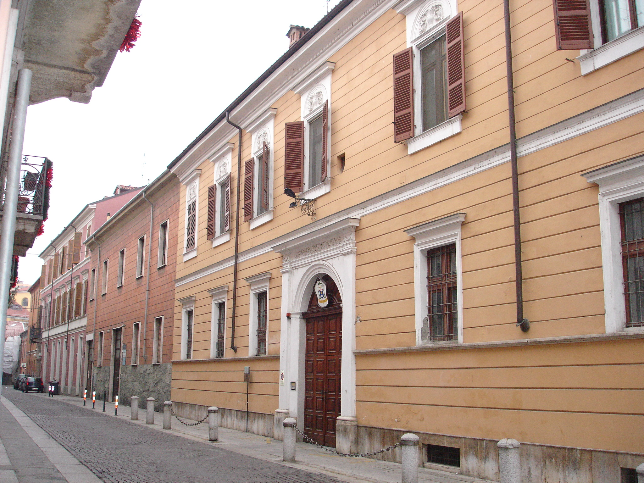 Alessandria, il Palazzo Vescovile, via del Vescovad. Autore della fotografia: Tony Frisina